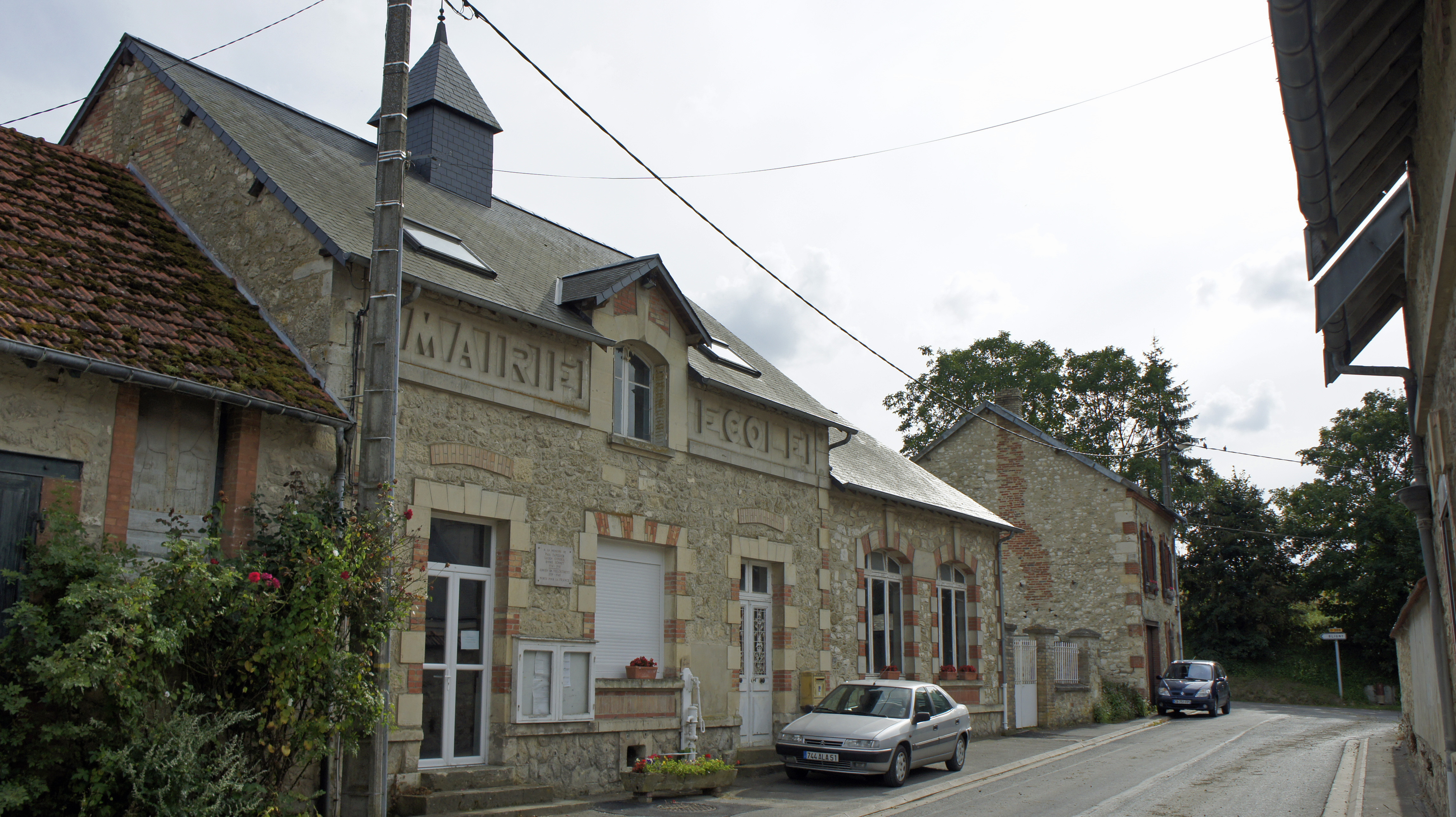 Le village d'Aubilly, vue de sa mairie.